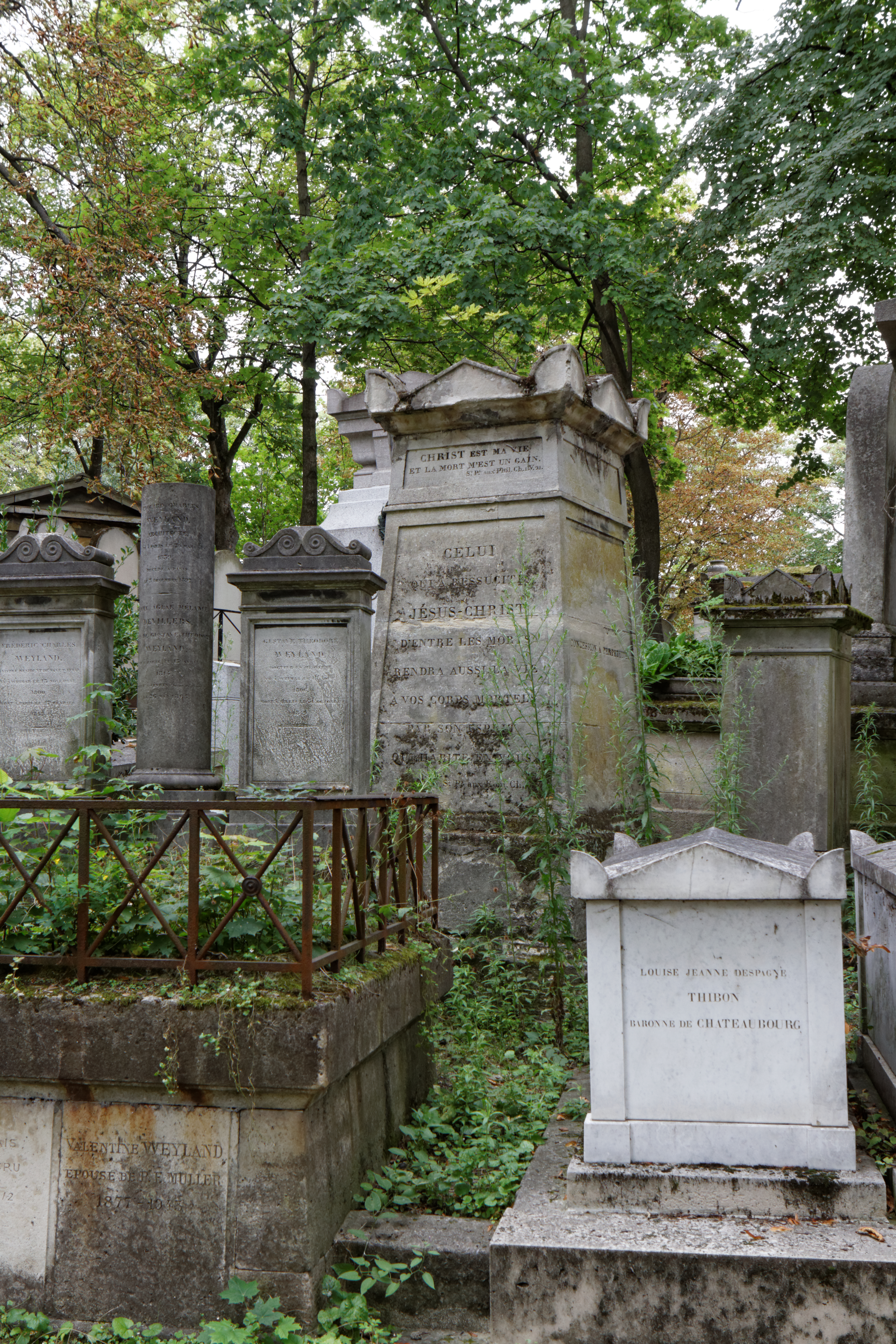 Sépulture du pasteur Jacques Antoine Rabaut-Pommier (1744-1820). Selon Moiroux, Jean-Paul Rabaut de Saint-Étienne y serait également enterré. Mais il est peu probable puisque les corps des personnes guillotinées n'étaient pas rendus à la famille.